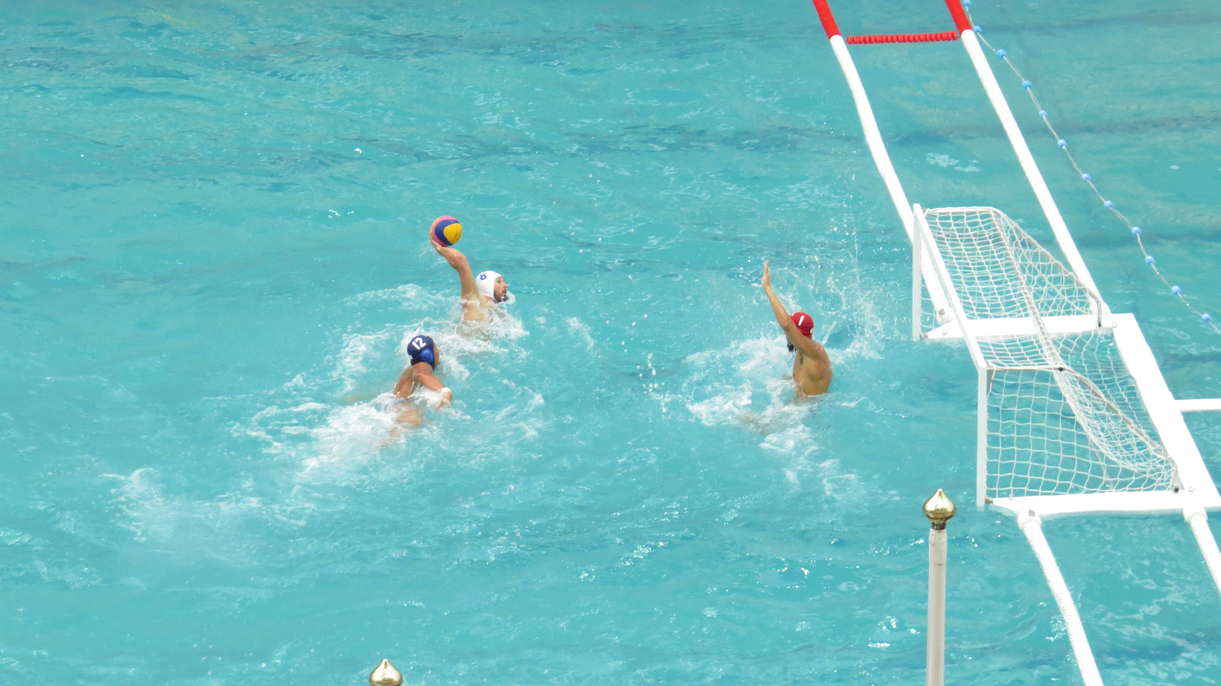 Rio 2016. Polo aquatico. sx50 81